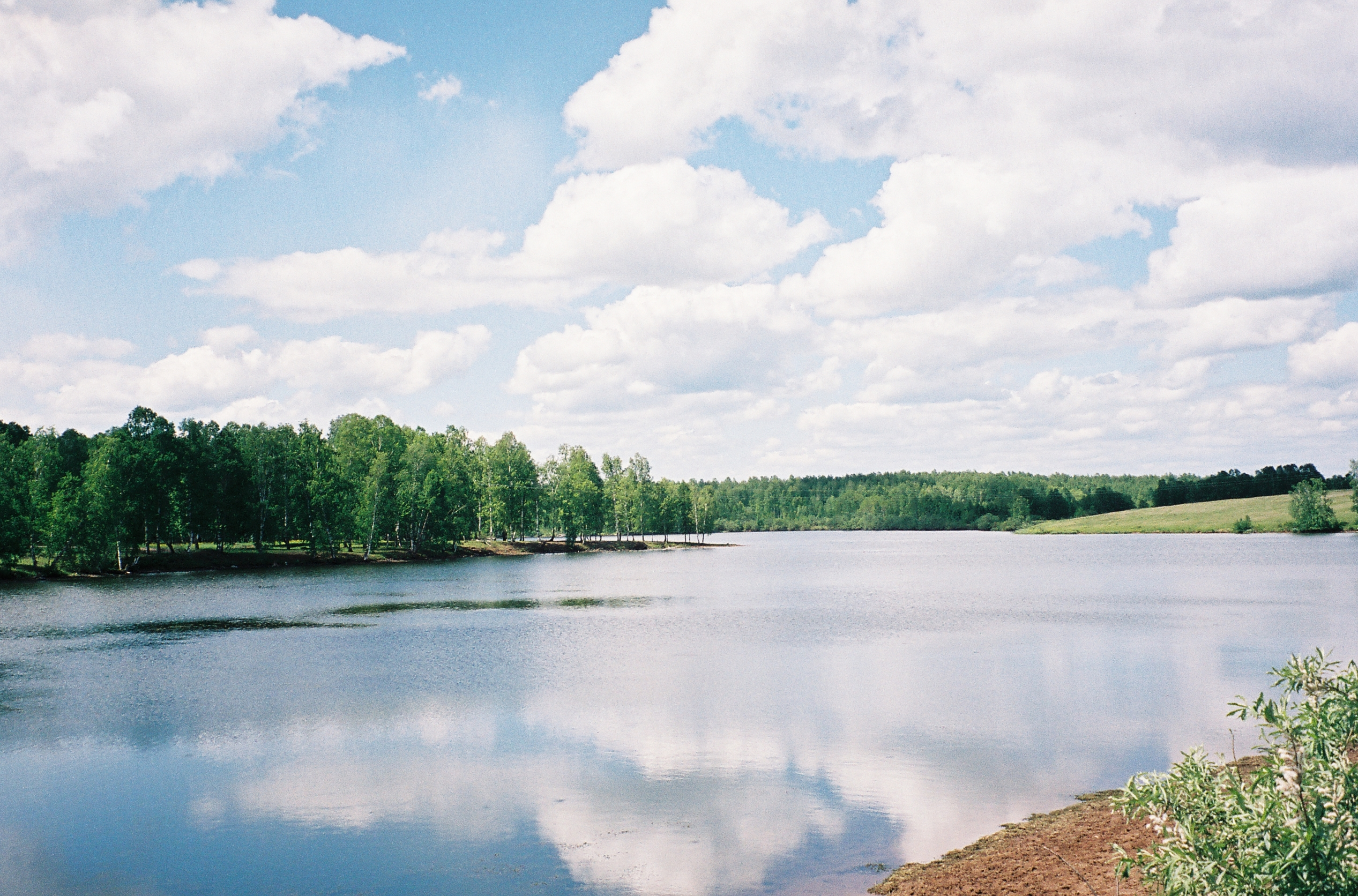 Арбайские озера в Красноярском крае